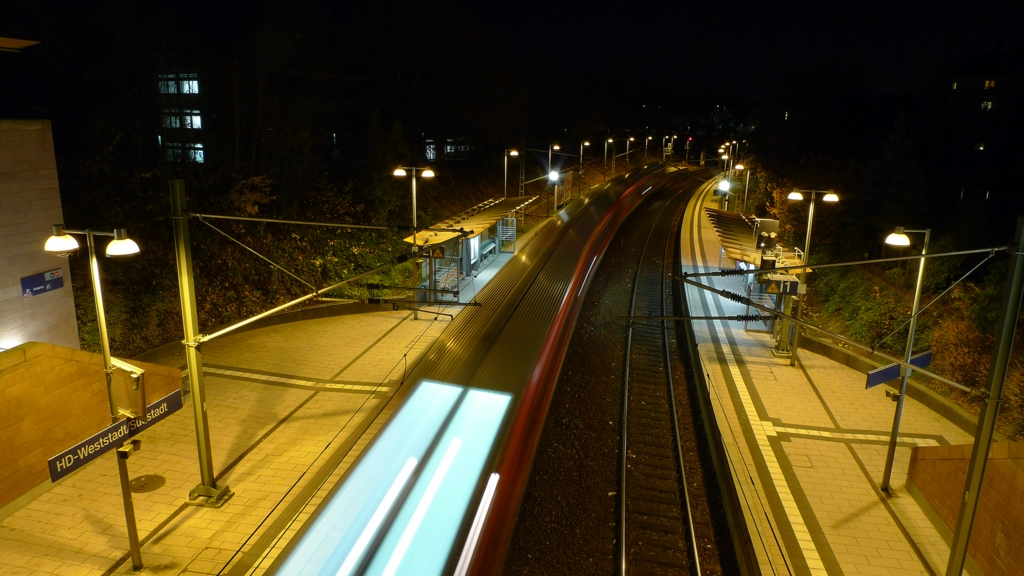 S-Bahnhof Weststadt Suedstadt Heidelberg